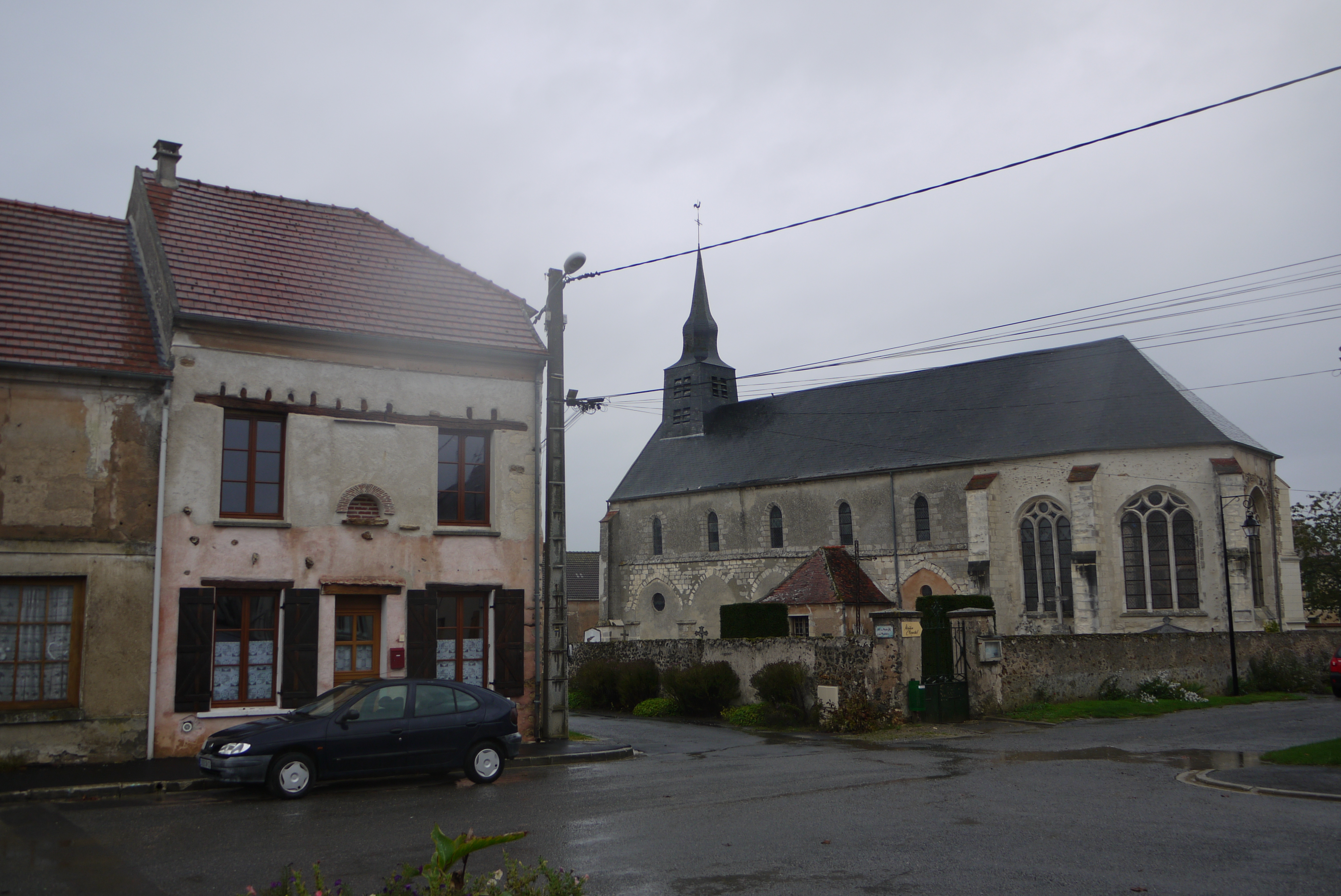 Villeneuve-sur-Fère, place Paul Claudel avec l'église.